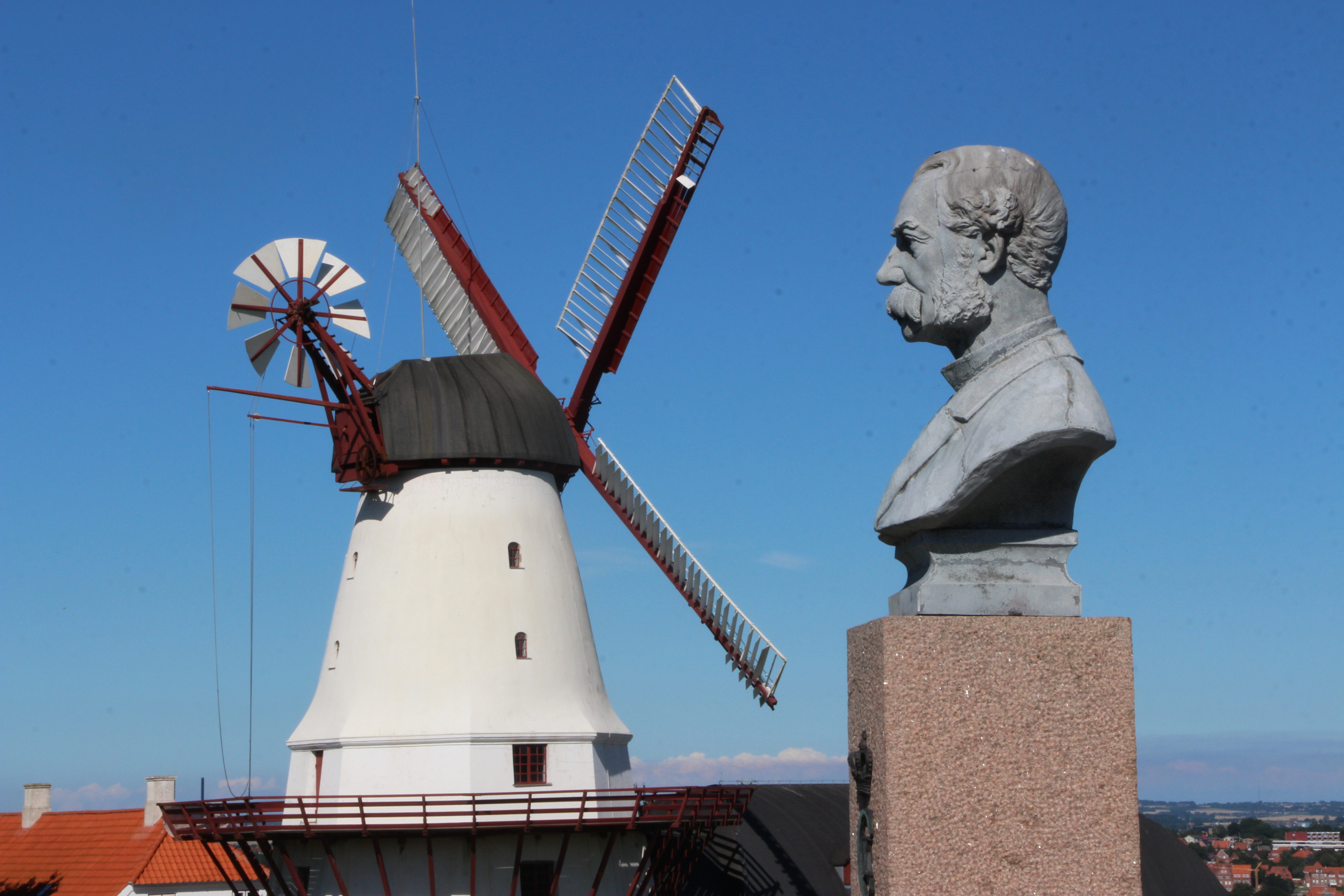 Düppeler Mühle